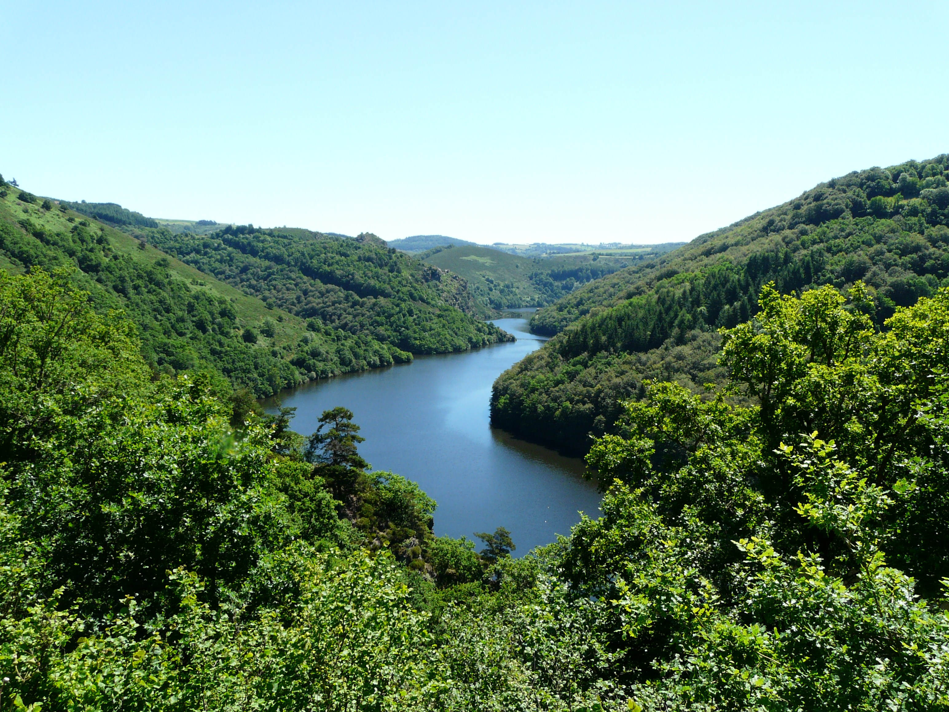 Le lac du barrage de Lanau dans les gorges de la Truyère, entre les communes de Neuvéglise (au premier plan ainsi qu'à gauche) et Saint-Martial (à droite), Cantal, France. Vue prise en direction de l'amont depuis la route départementale 921, près de Lher.